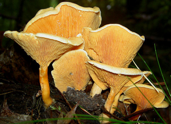 Falscher Pfifferling Hygrophoropsis aurantiaca Fotograf: Walter J. Pilsak, Waldsassen Copyright Status: GNU Freie Dokumentationslizenz